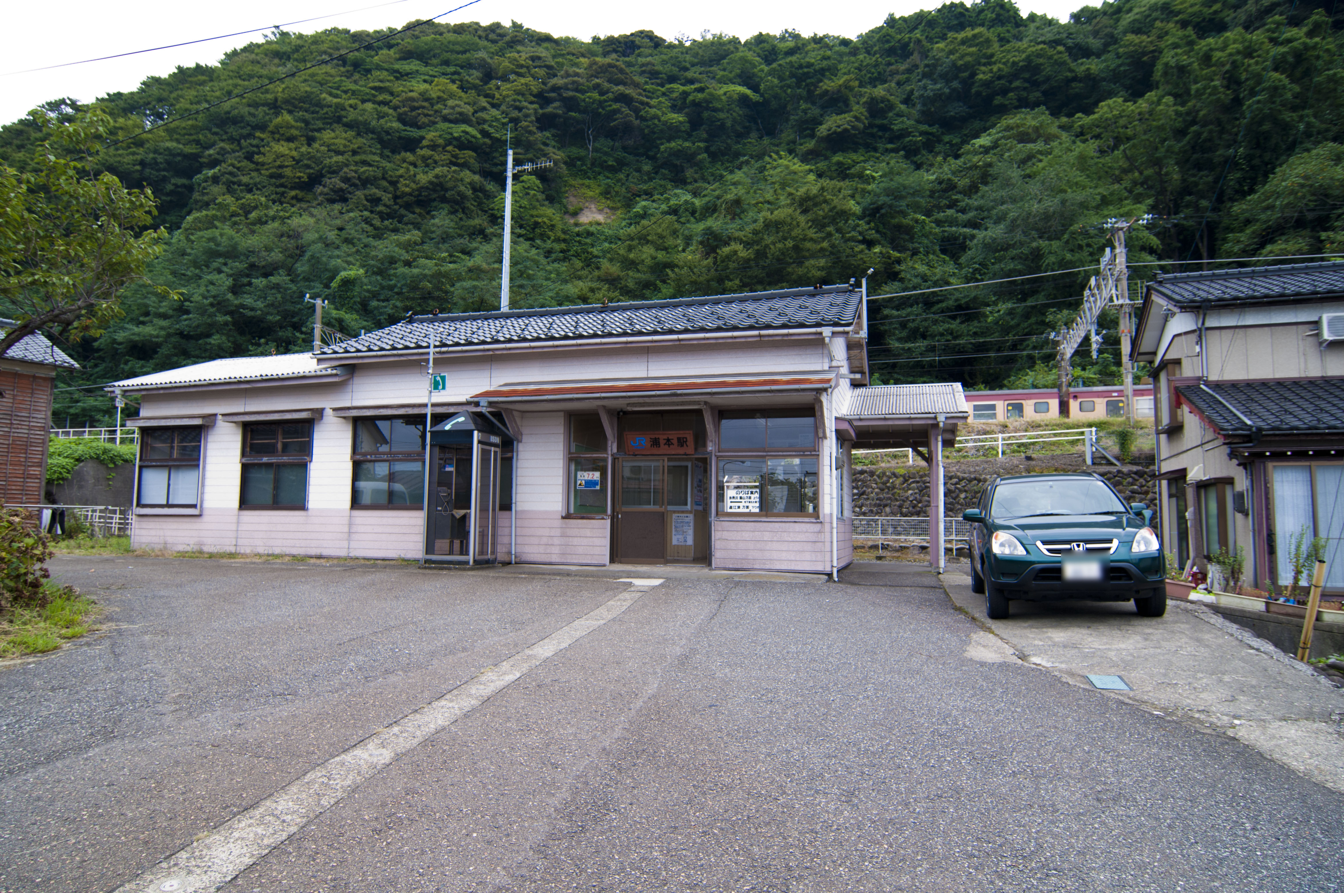 西日本旅客鉄道株式会社北陸本線浦本駅駅舎